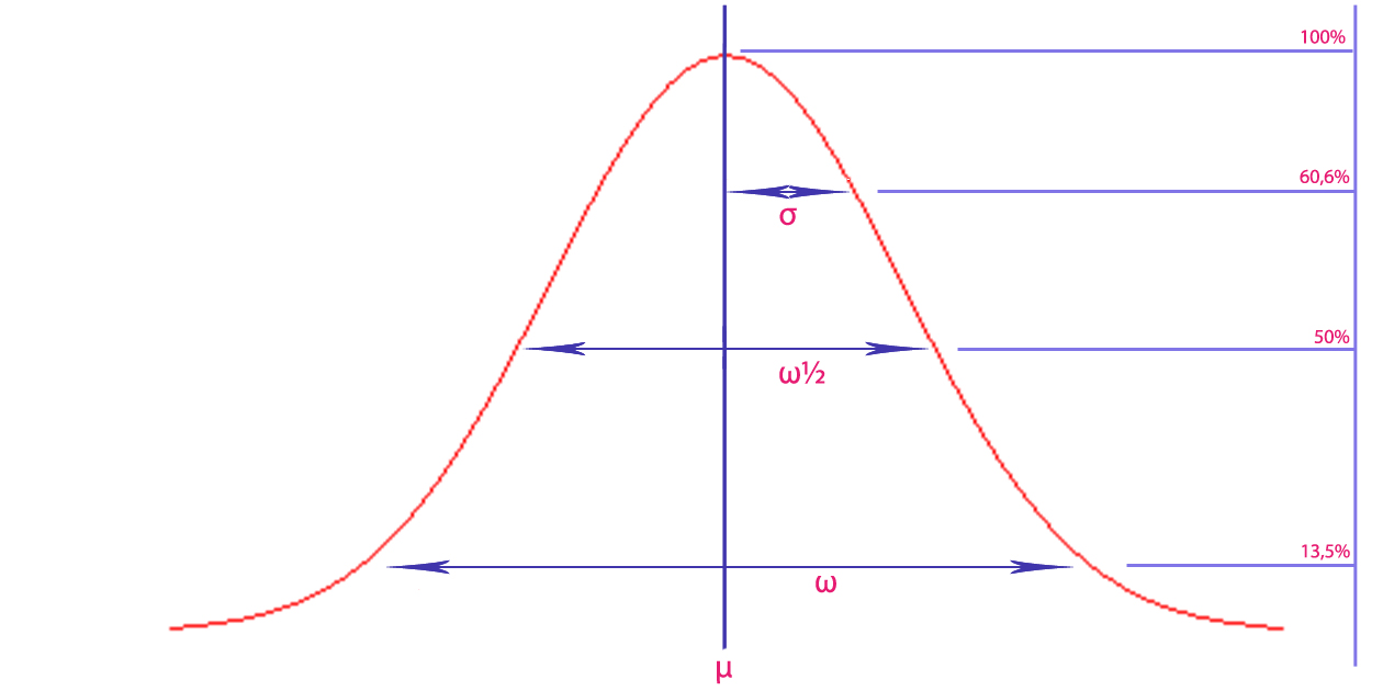 piekvormen